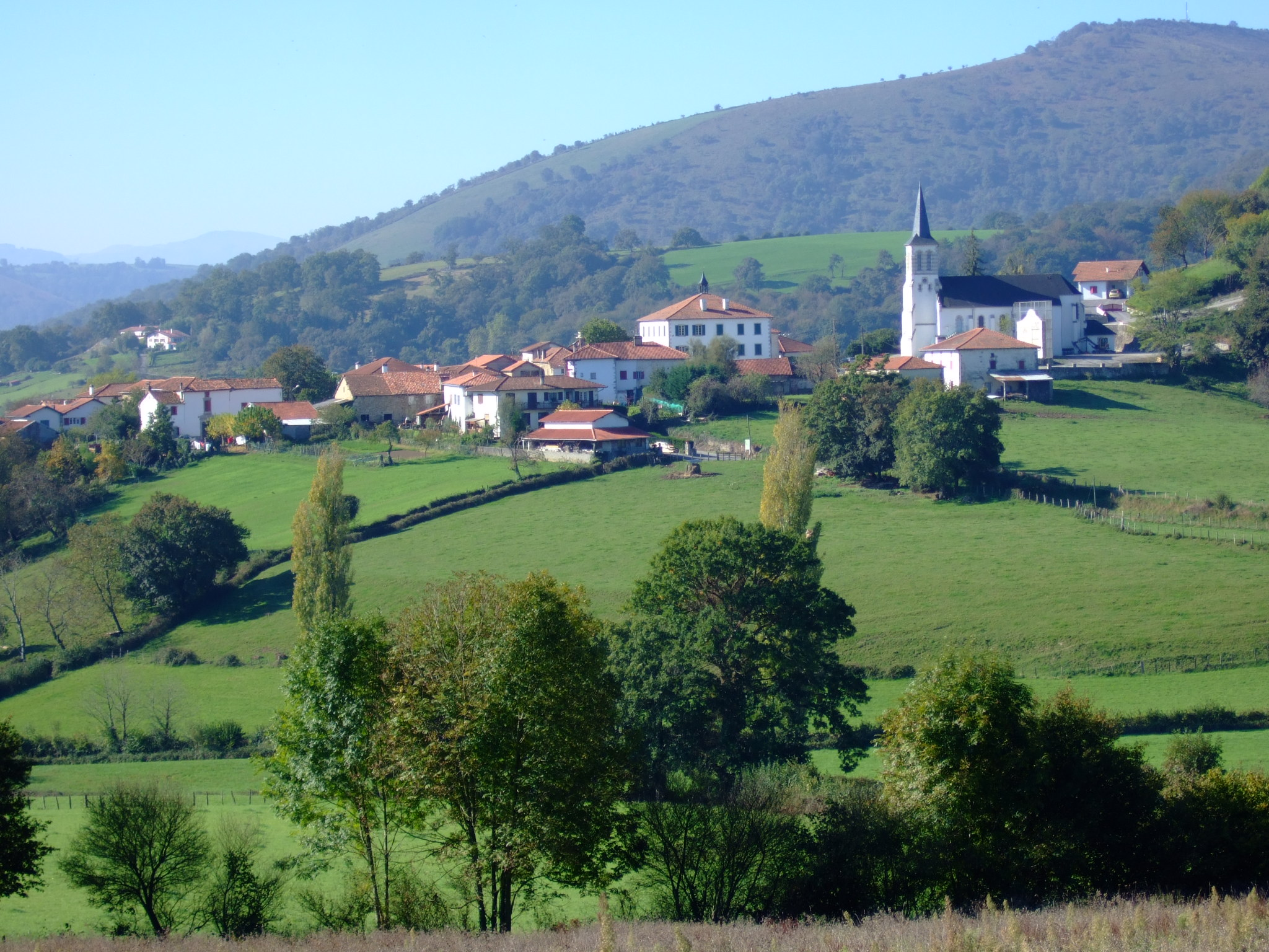 Vue générale d'Ostabat